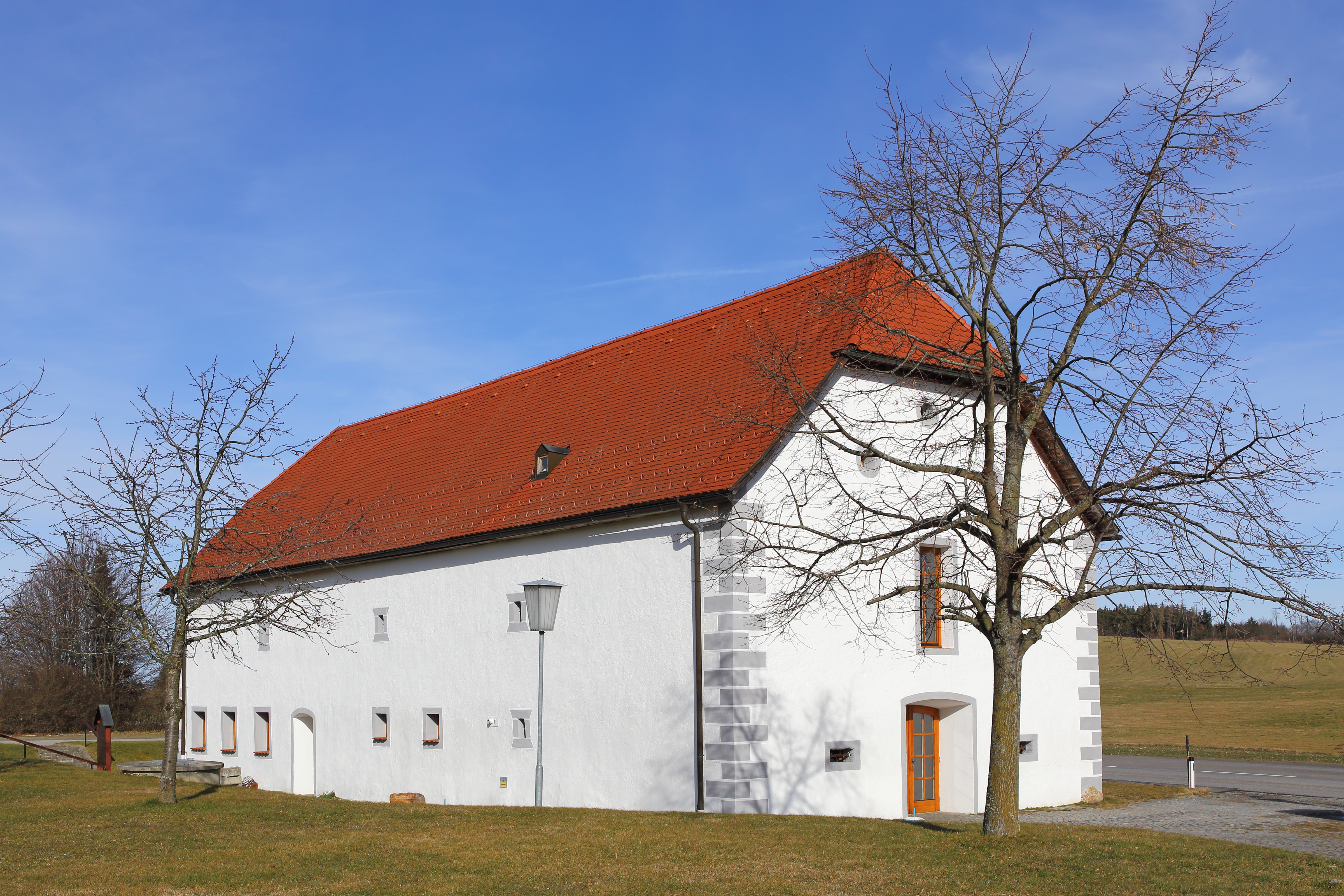 Der Getreidespeicher in Rottenbach wurde wahrscheinlich im 18. Jahrhundert erbaut. Er hat ein Schopfwalmdach und Gaupen.